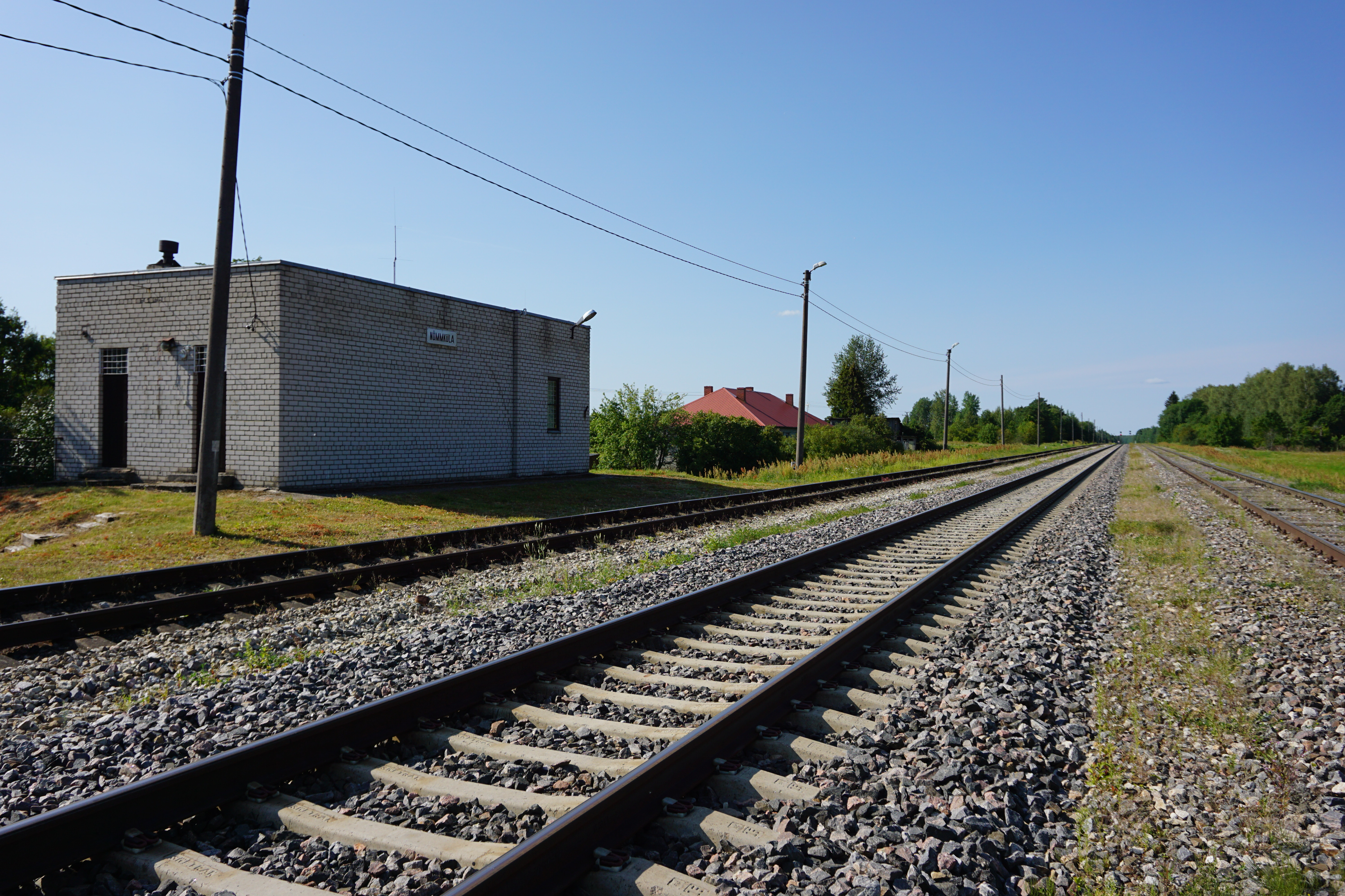 Nõmmküla raudteejaam